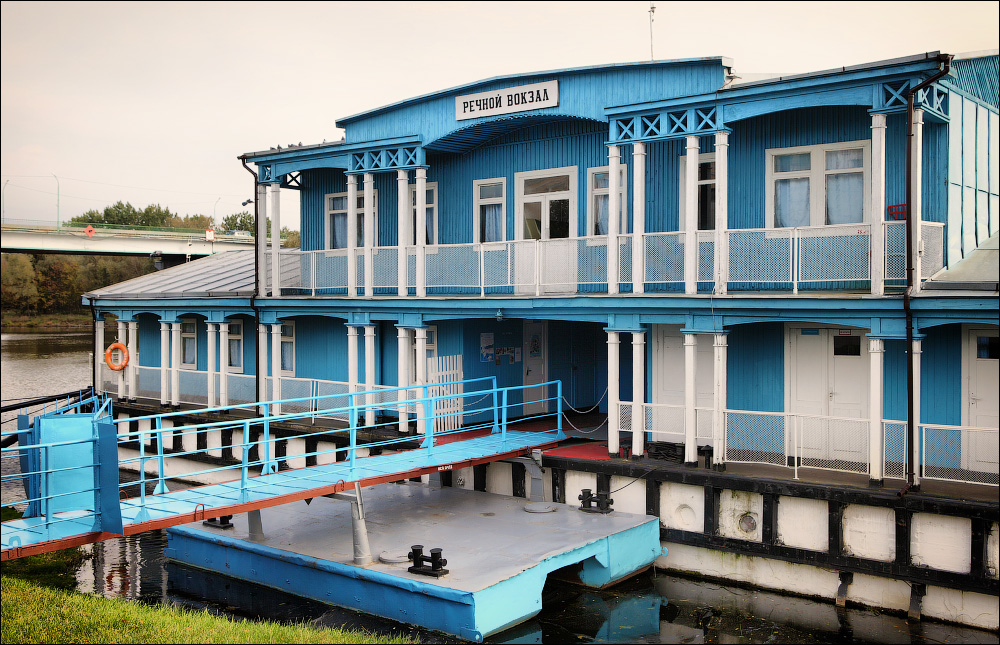 Пінскія замалёўкі. Рачны вакзал